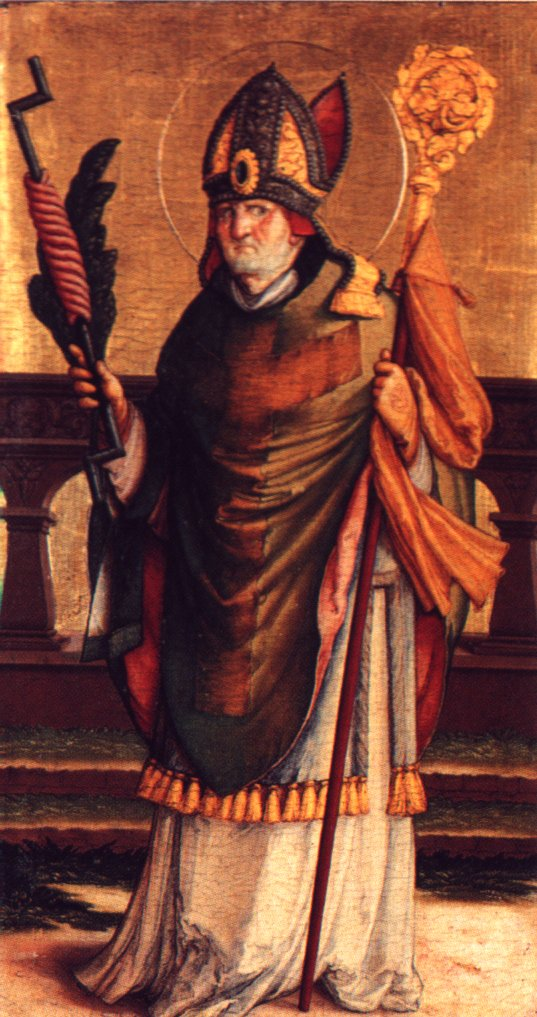 Falkensteiner Retabel rechter Drehflügel, außen, Hl. Erasmus Eingescannt aus: Anna Moraht-Fromm und Hans Westhoff: Der Meister von Meßkirch – Forschungen zur südwestdeutschen Malerei des 16. Jahrhunderts, Ulm, 1997, S. 65, oben rechts